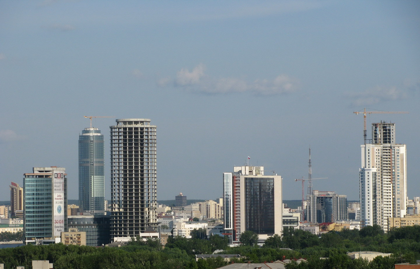 Строящиеся здания в центре Екатеринбурга